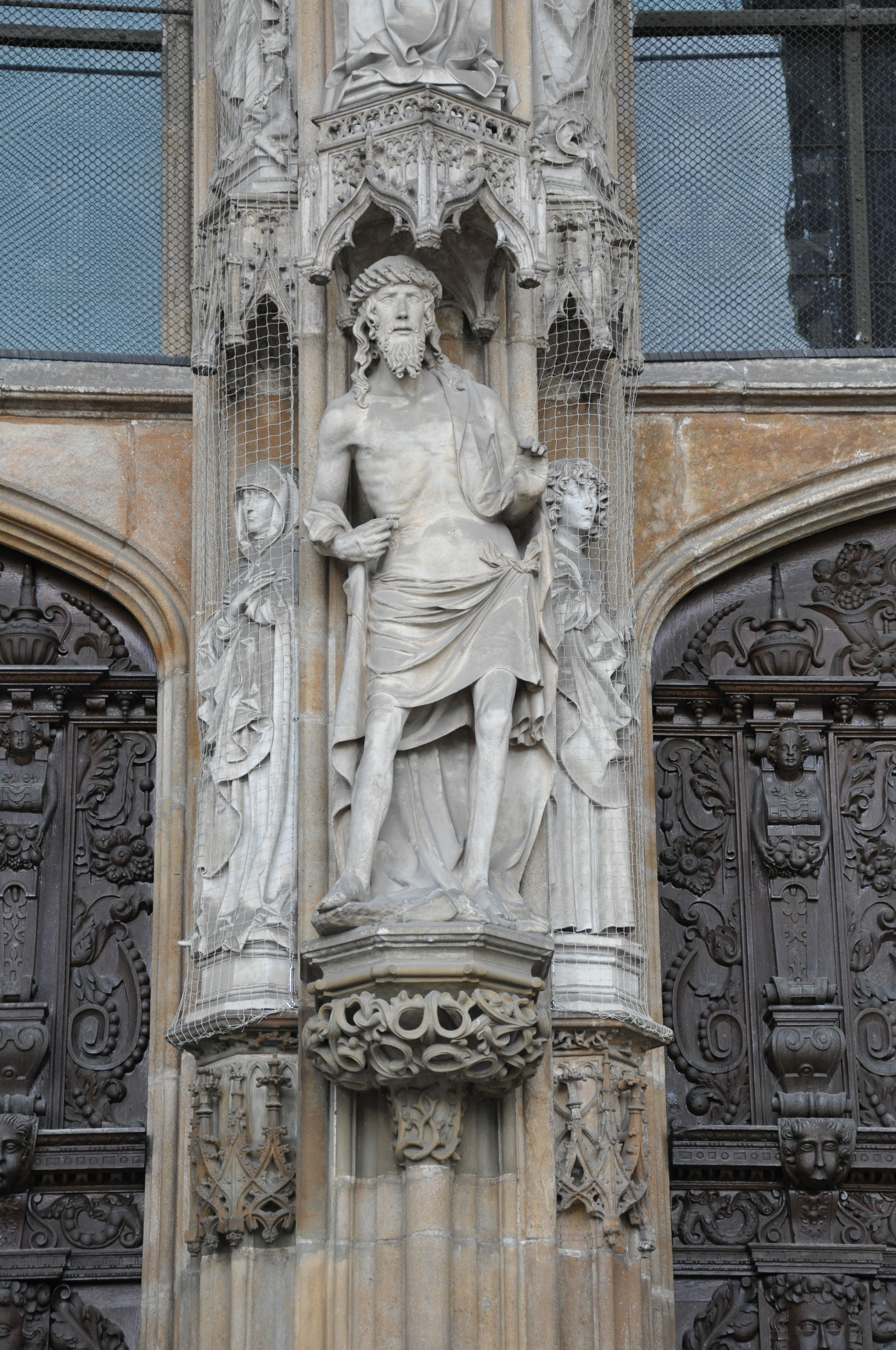 Ulm, Ulmer Münster, Hauptportal